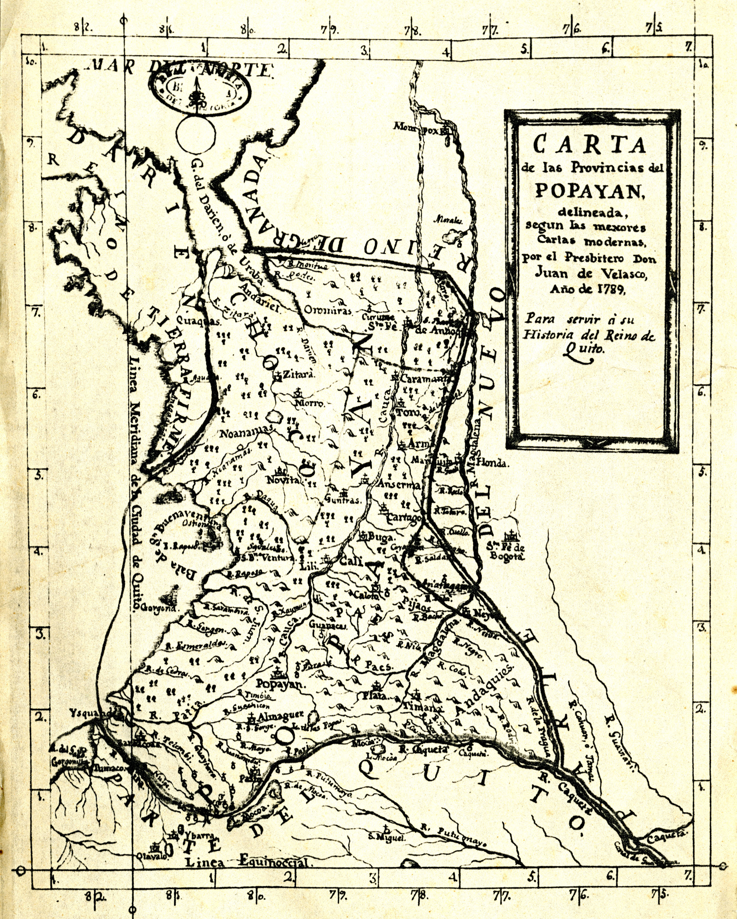 Mapa de la porción territorial occidental de la Gobernación del Popayán en la Audiencia de Quito según Juan de Velasco (1789). Diapositiva de Consulta y acceso publico cuya información fue investigada de un libro y/o ejemplar de revisión custodiado en los Fondos Bibliográficos y Cartográfico (Sección Siglo XVIII o Etapa Colonial) del Archivo Histórico del Guayas; Guayaquil, Ecuador. Compartido y consultado por J. Javier García A.